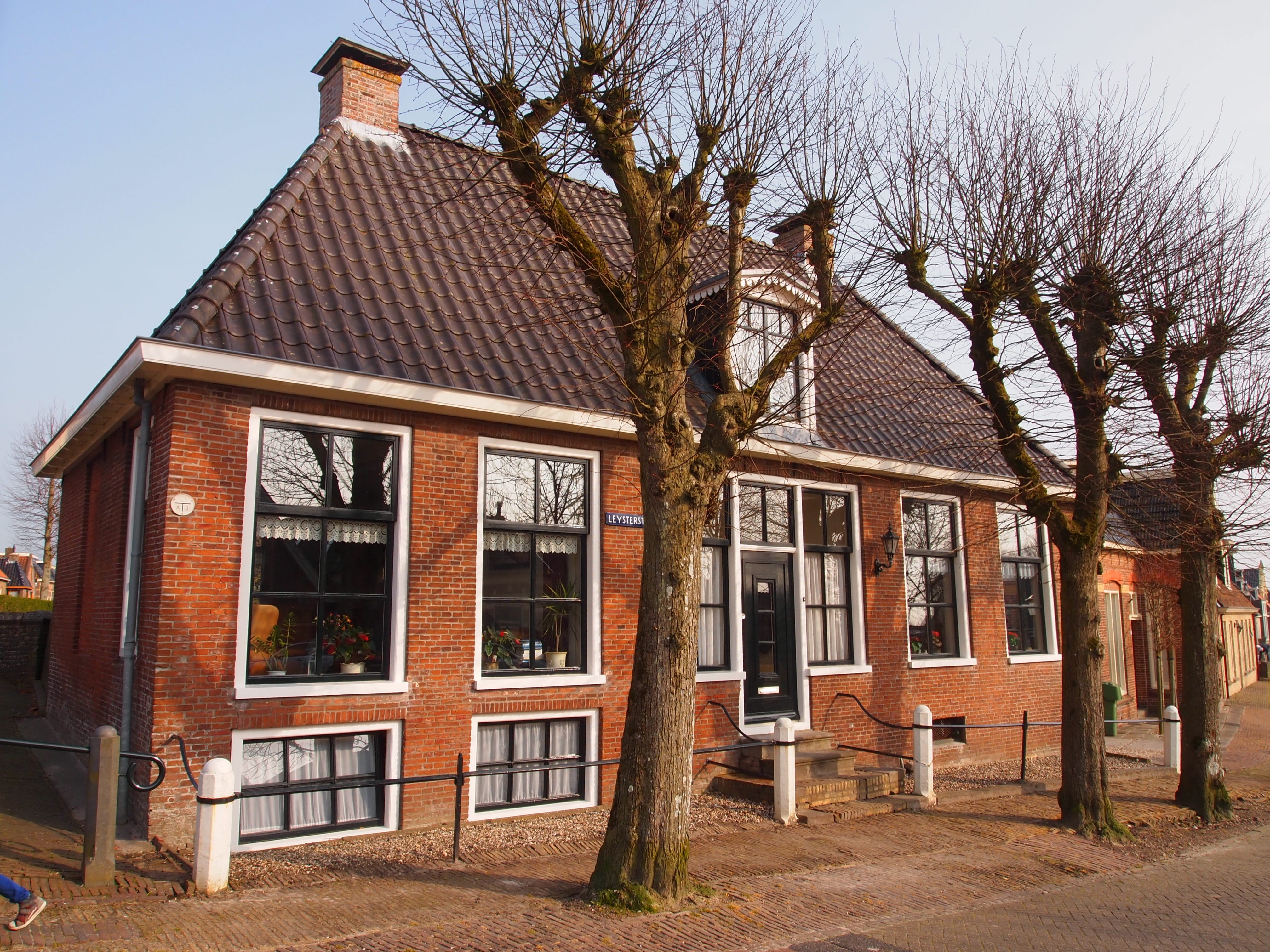 Leijsterstreek 1, Oudebildtzijl